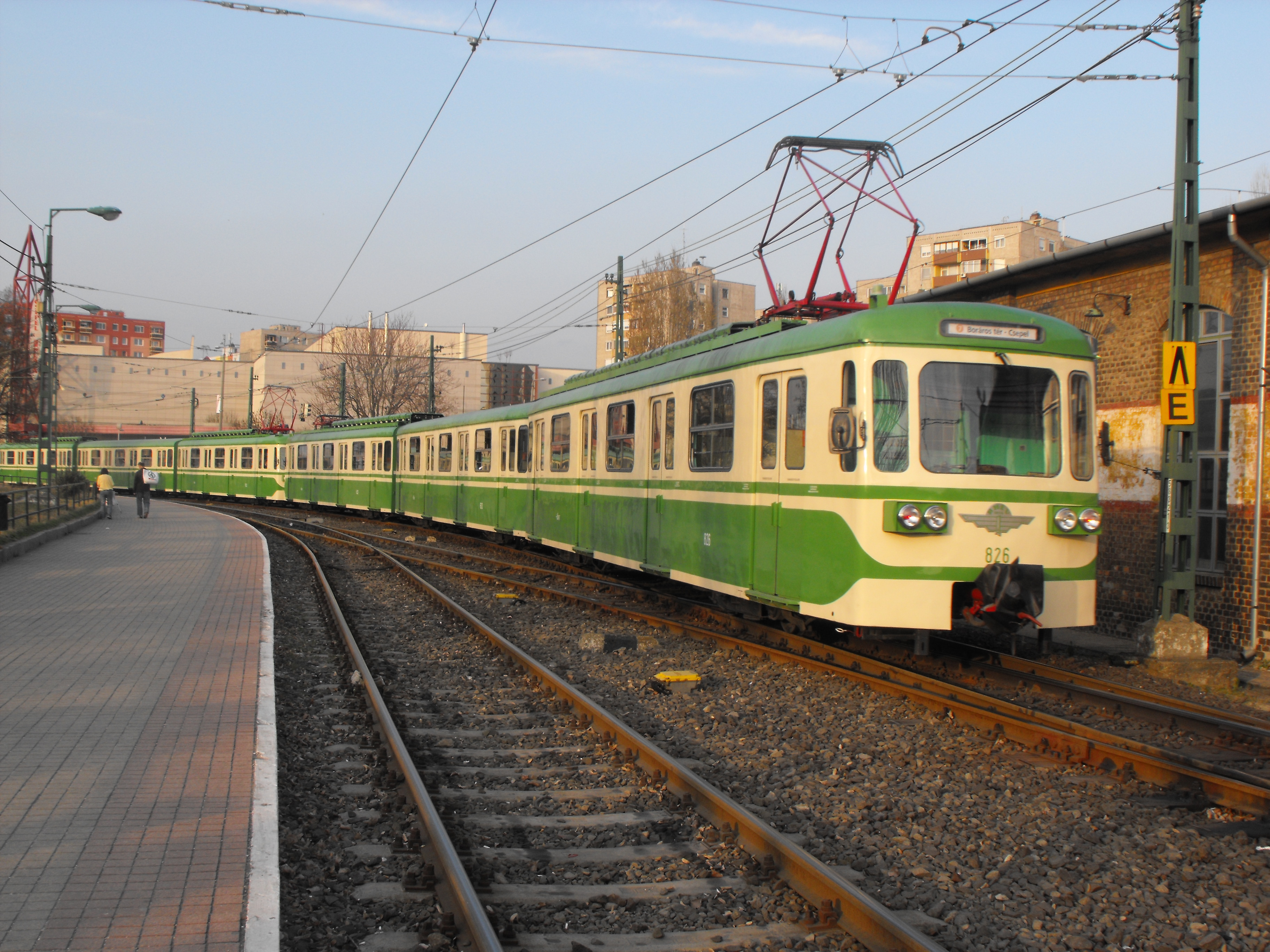 MIX/A HÉV Csepel HÉV-állomáson (825-613-826-832-616-832)